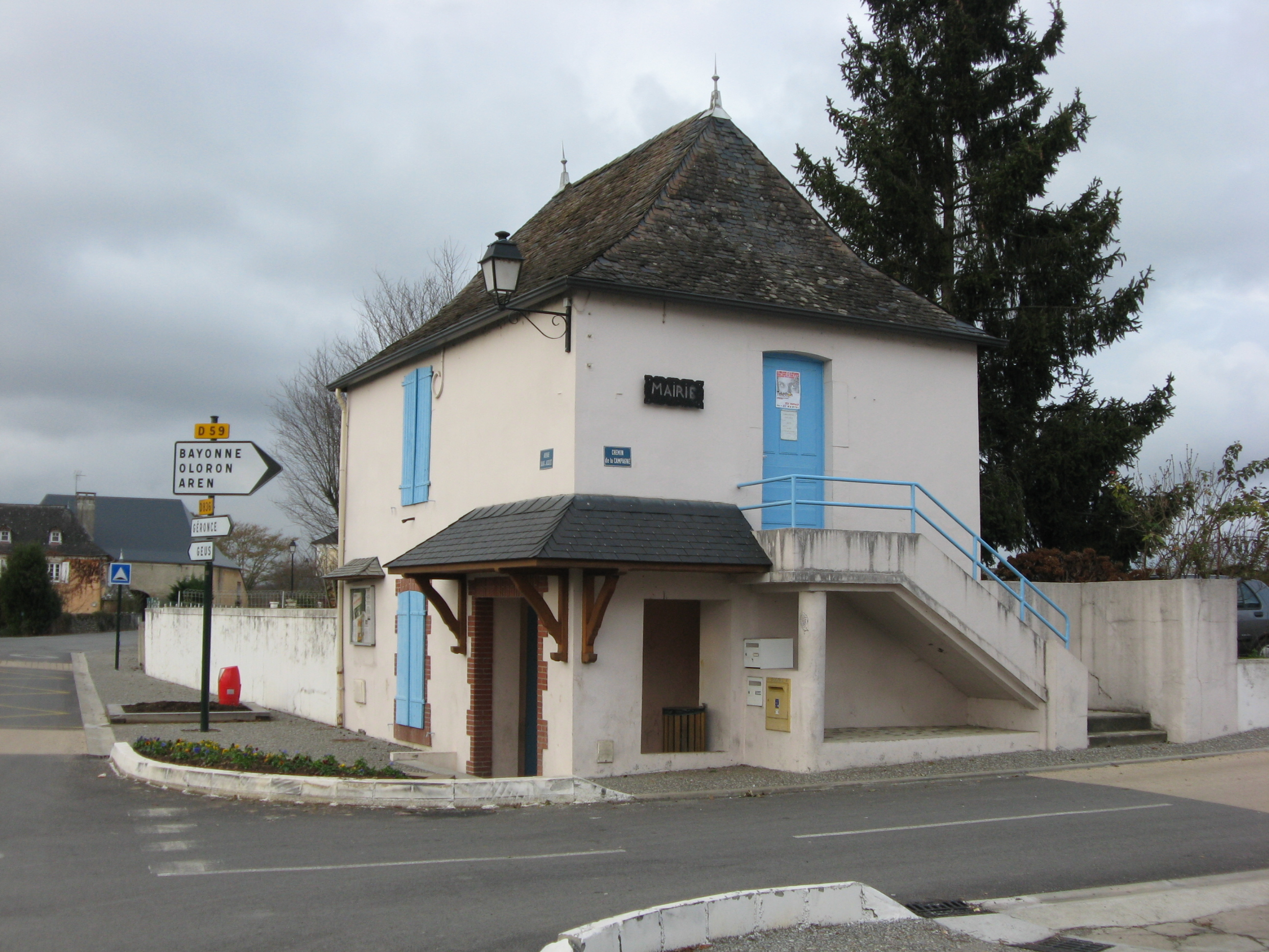 Mairie de Saint-Goin (Pyrénées-Atlantiques) (Pyrénées).